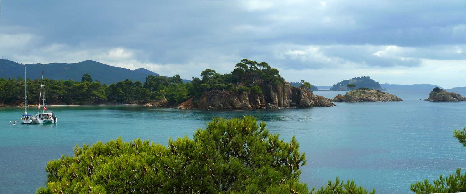 Ilots de l'Estagnol vus depuis le Cap de Léoube- Bormes les Mimosas - France